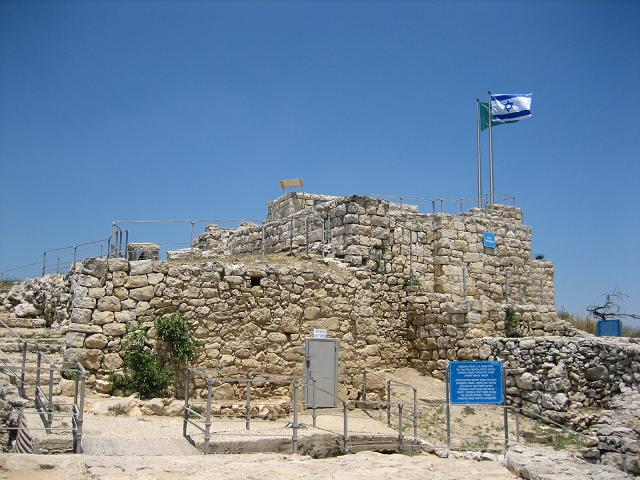 מבצר הקסטל. צילום לכיוון צפון מזרח. צילמתי והעלתי במאי 2006. אסף.צ 17:54, 9 מאי 2006 (IDT) The Castel (or Qastel) fortress near Jerusalem, Israel